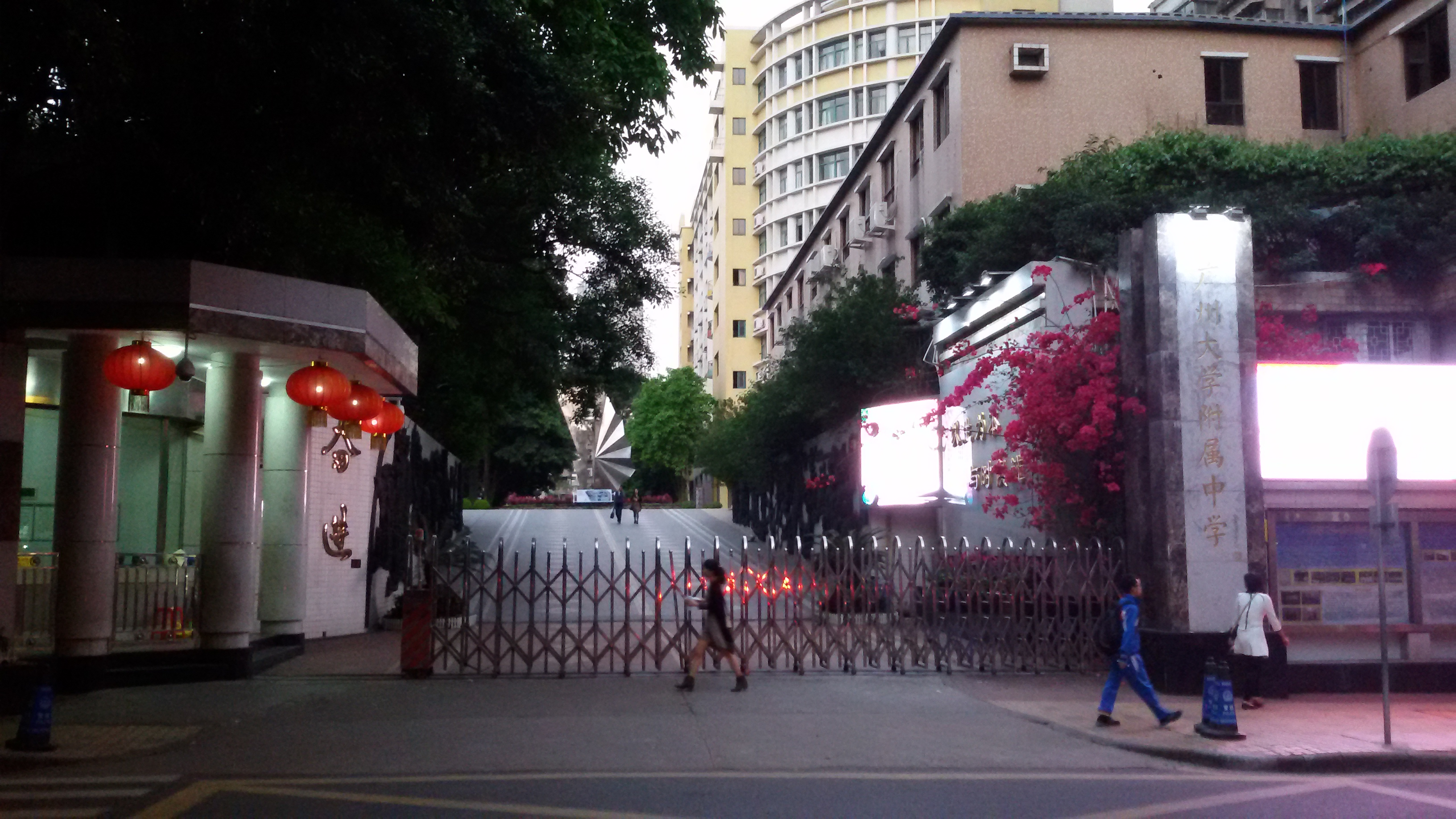 粵語: 廣州大學附屬中學（黃華路校區）